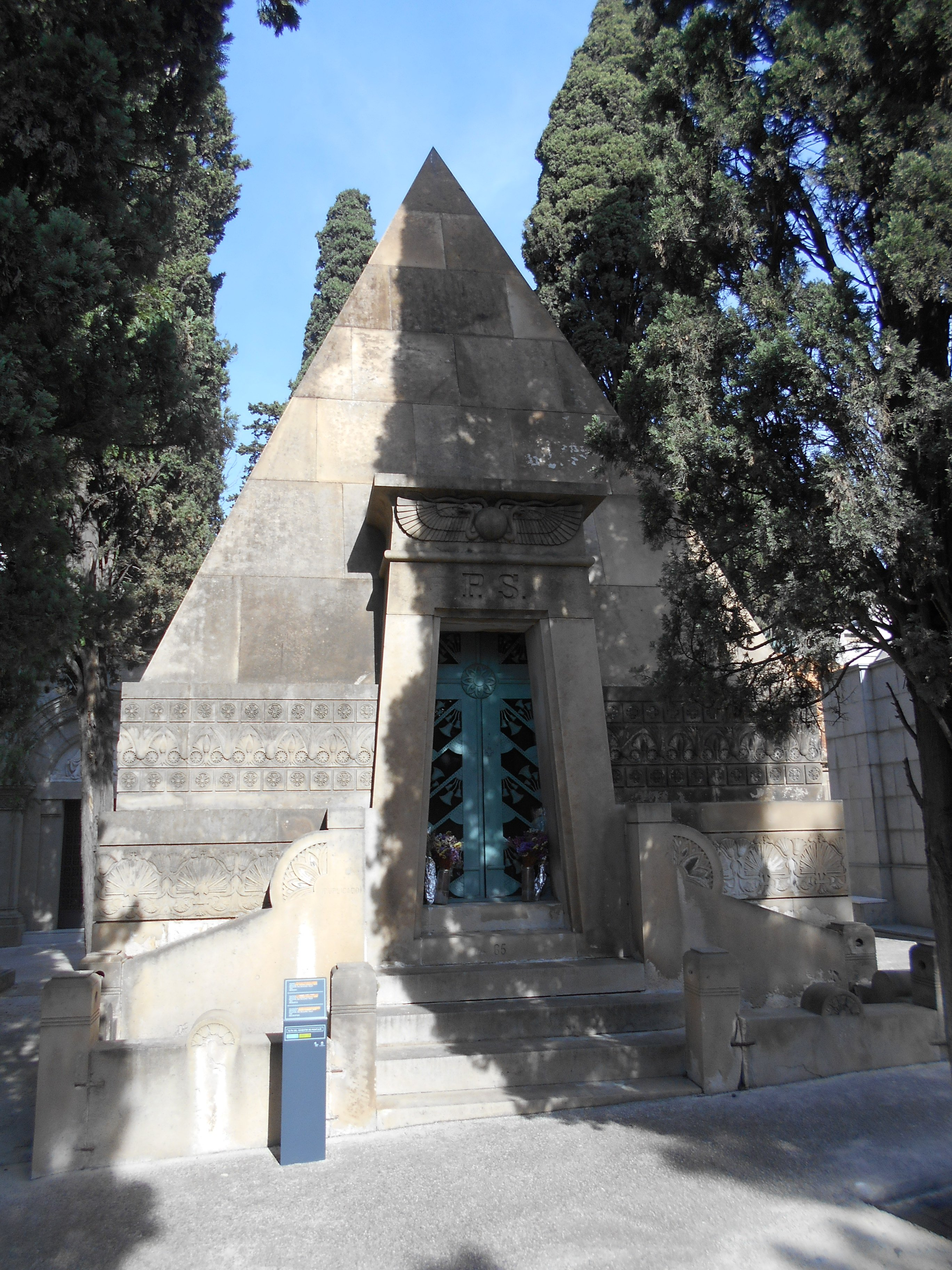 Panteó Pilar Soler, de Leandre Albareda y Pau Deulofeu.